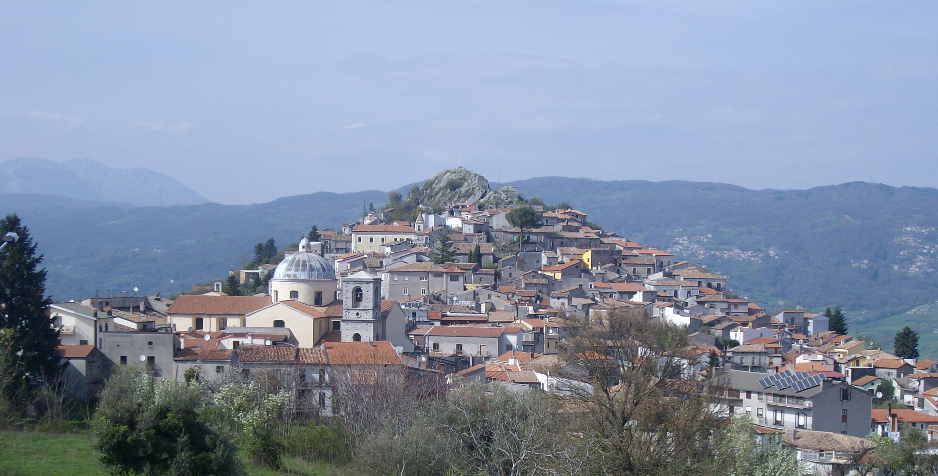 Vista di Rotonda